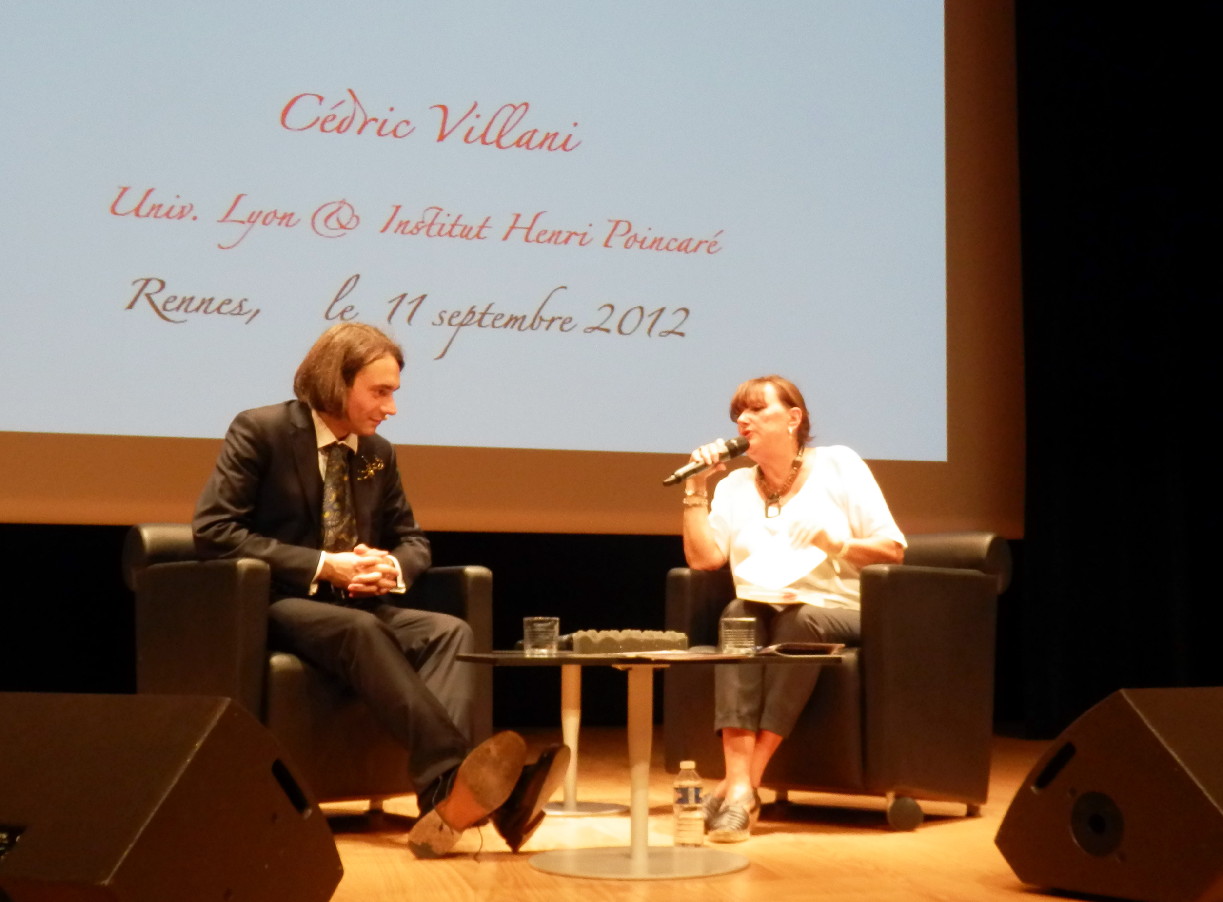 Mardi de l'Espace des sciences du 11 septembre 2012. Invité : Cédric Villani.